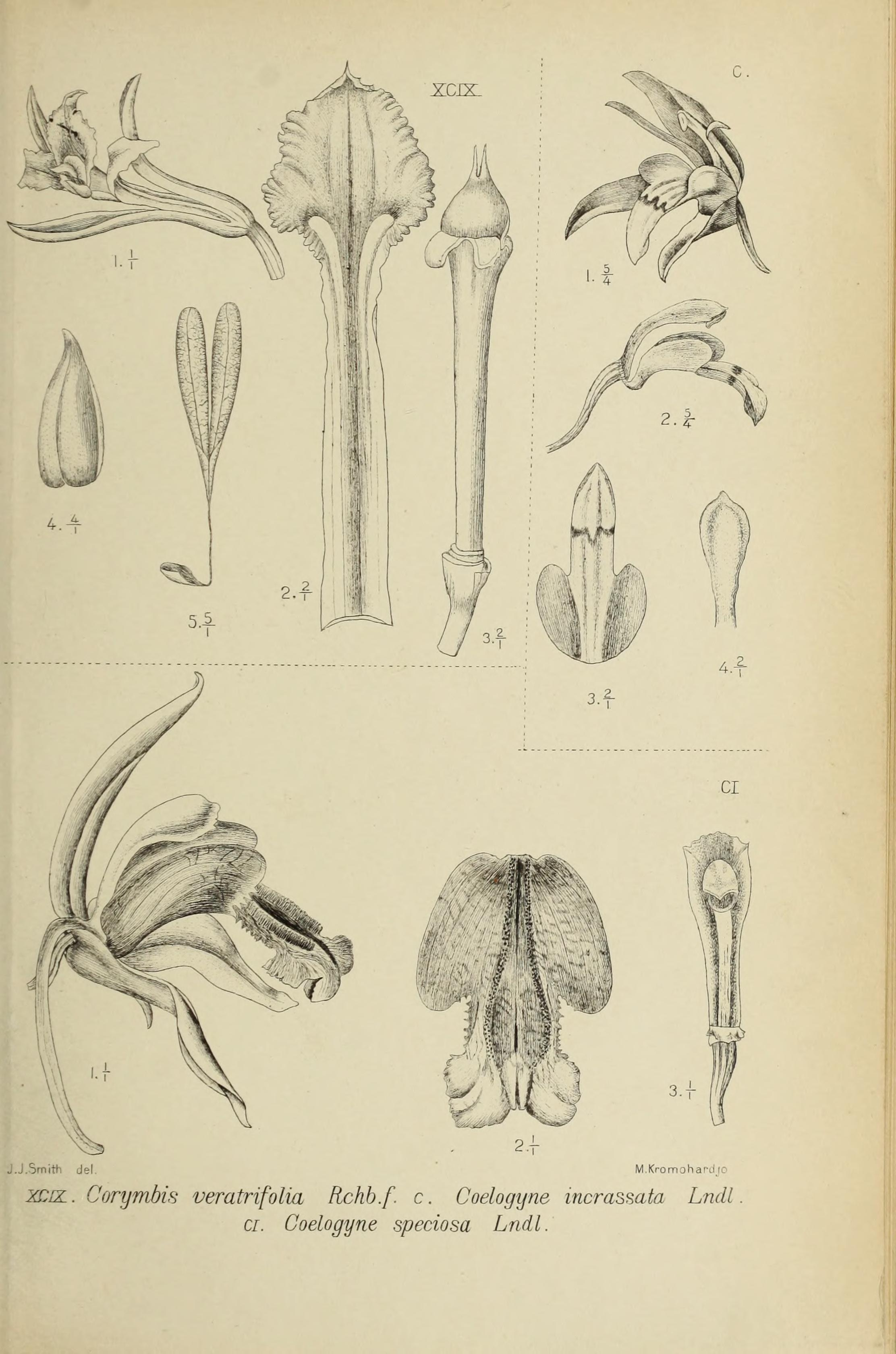 Die orchideen von Java /